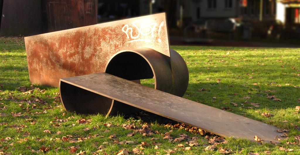 thumb|right|anderer Blickwinkel (Original text: Große Zylinderskulptur II, 1981, (Museum Ostwall, Dortmund)) Datum: 15.12.2004 Fotograf: Hans Peter Schaefer Url: Kategorie:Bild (Dortmund)